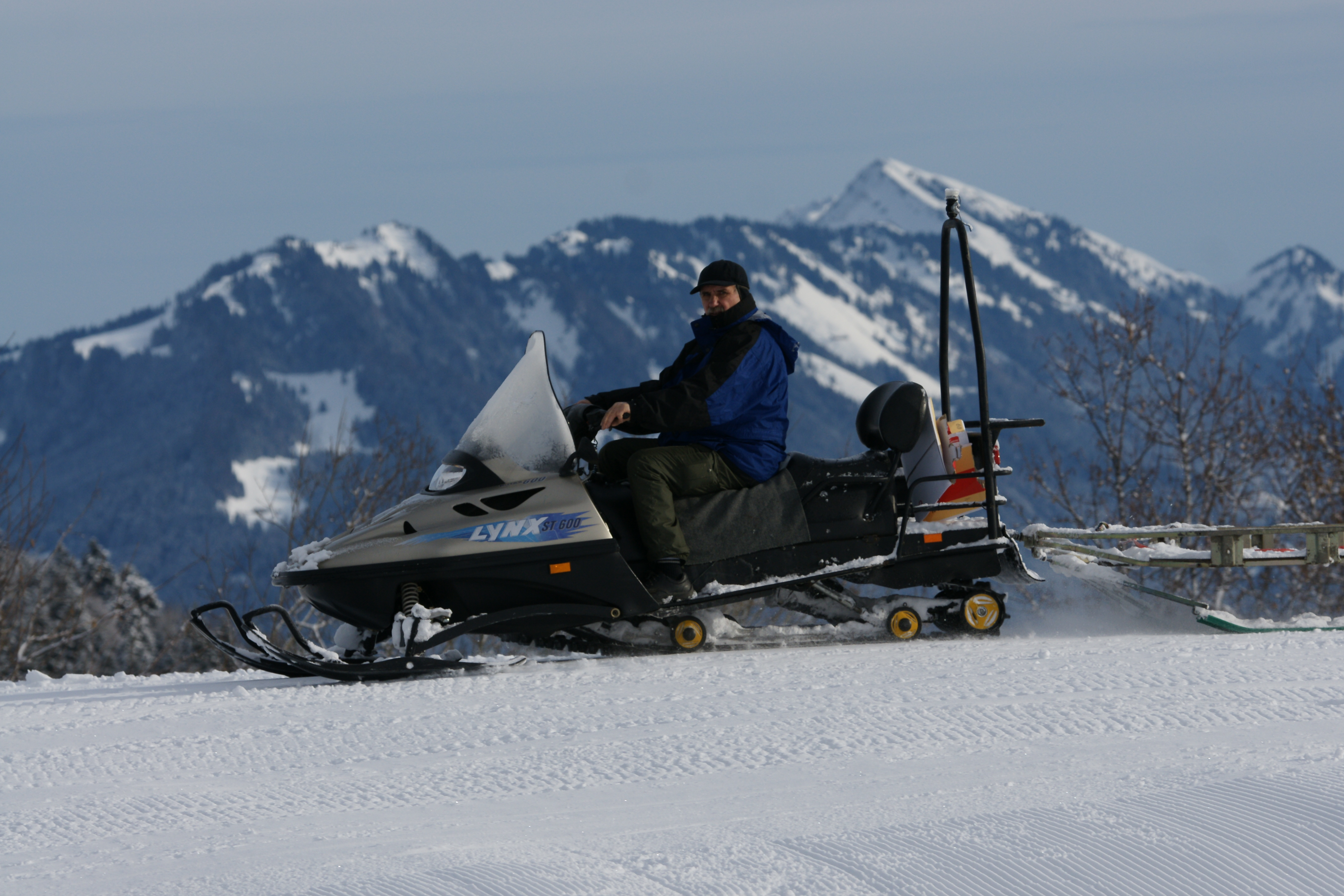 Als Schneemobile oder Motorschlitten werden Kraftfahrzeuge bezeichnet, die auf nicht präparierten Schneepisten ein bis zwei Personen transportieren können. Sie werden durch Kufen gelenkt, die Motorkraft wird über eine Kette übertragen. Gelegentlich werden sie auch Ski-doo genannt. Gesehen auf dem Bödele. Im Bild der Arbeitsschlitten LYNX ST600 von Bombardier Recreational Products oder BRP